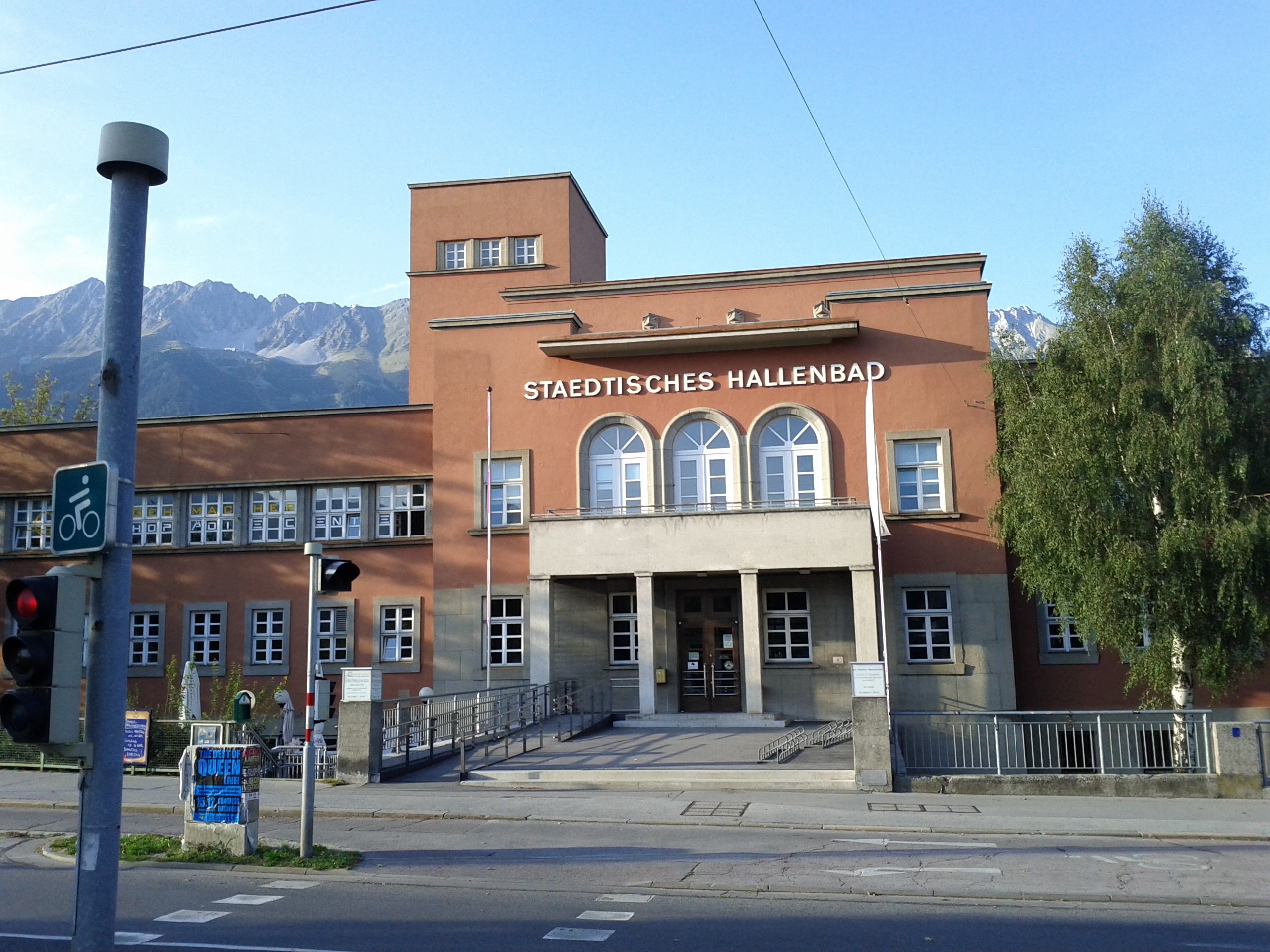 Städtisches Hallenbad This media shows the remarkable cultural object in the Austrian state of Tyrol listed by the Tyrolean Art Cadastre with the ID 14566. (on tirisMaps, pdf, more images on Commons, Wikidata)